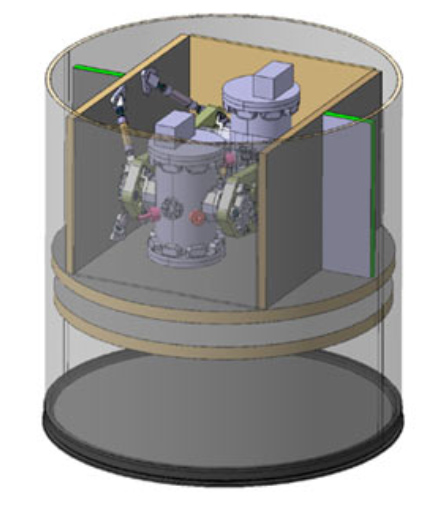 Le LPT (LISA Technology Package) du satellite LISA Pathfinder. Il contient deux masses d'épreuves ayant la forme de cubes de 46 mm de côté en or et platine. Chacun est en suspension dansun conteneur sous vide. Ils servent à la fois de miroirs pour l'interféromètre et de références inertielles pour le système de contrôle de compensation